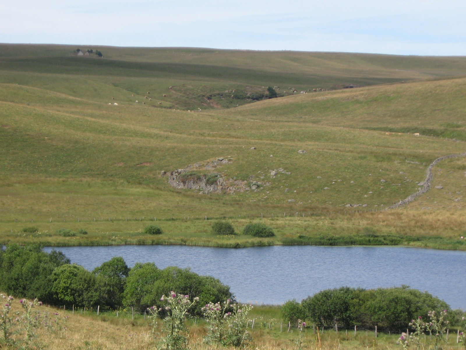 Lac de Souveyrols